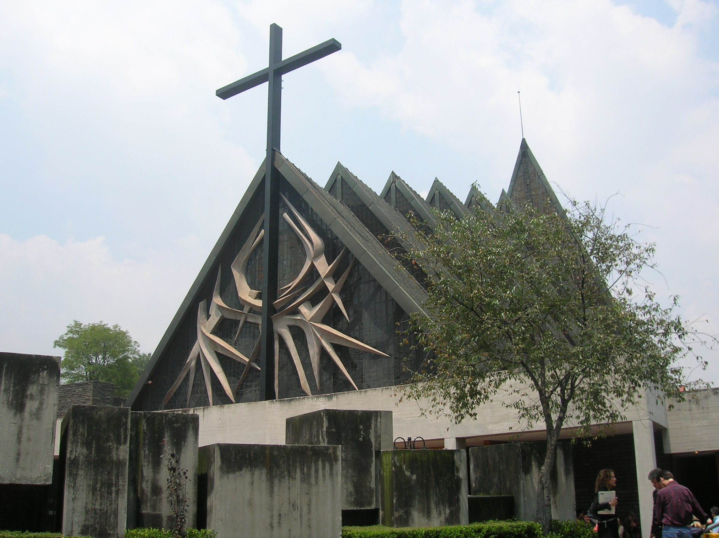 Iglesia, Jardines del Pedregal